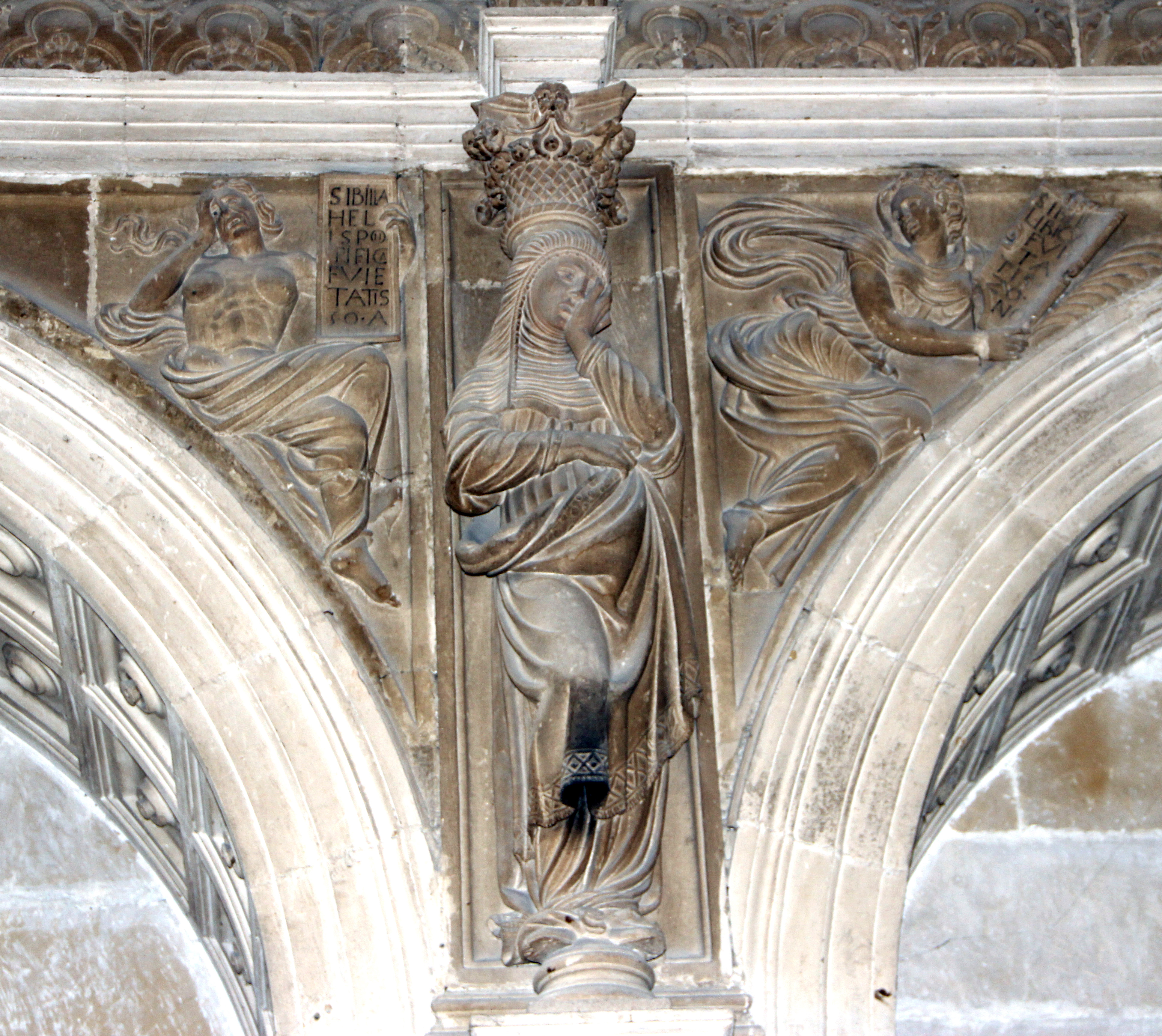 La Vierge entre deux sibylles. Sacristie de la Sacra Capilla del Salvador à Ubeda. Sculpture d'Esteban Jamete selon un dessin de Andrés de Vandelvira